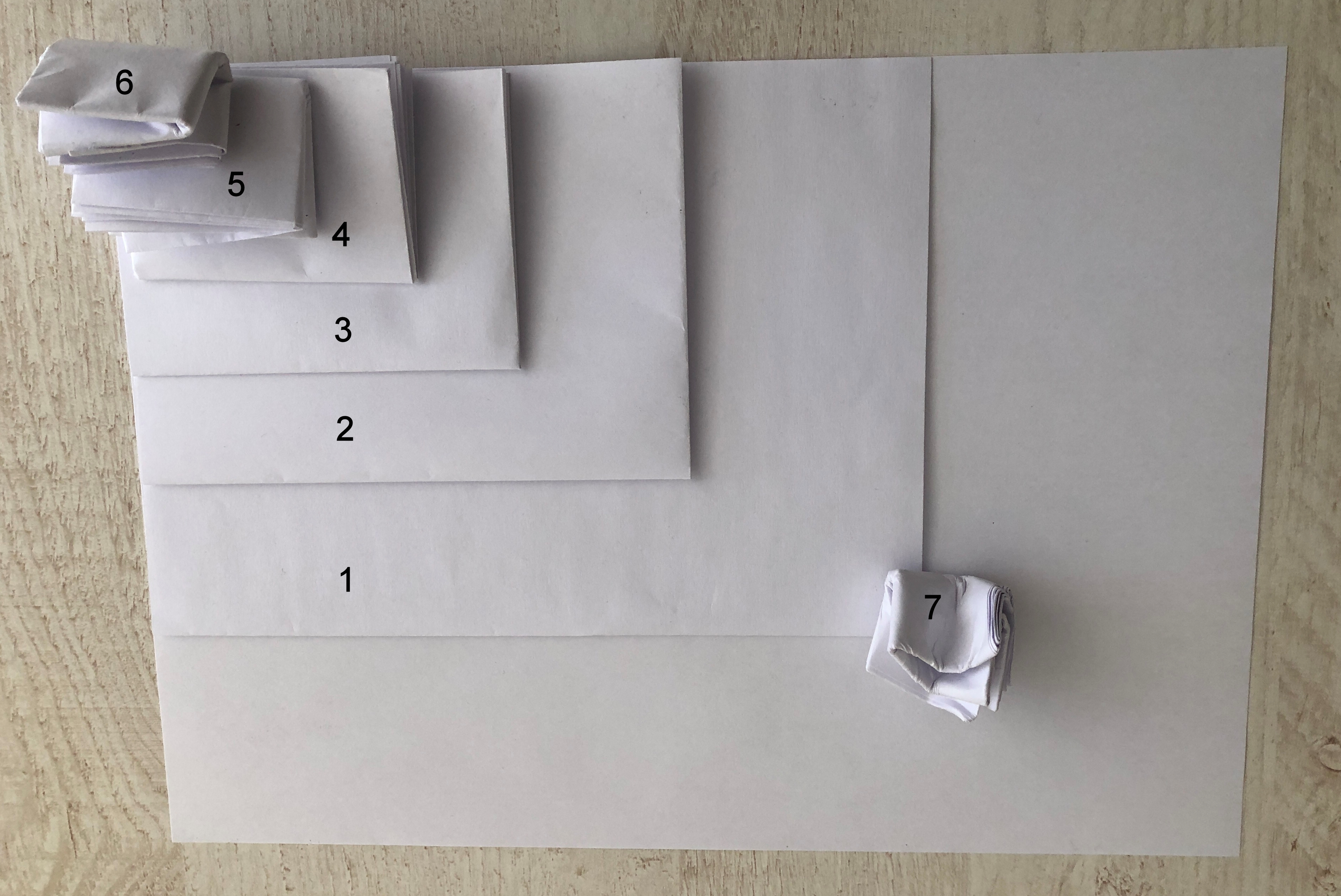 DIN A4 Seiten sieben Male gefaltet. Faltung Sieben war nur noch mit großer Mühe möglich, sie behält nicht mehr ihre Form.